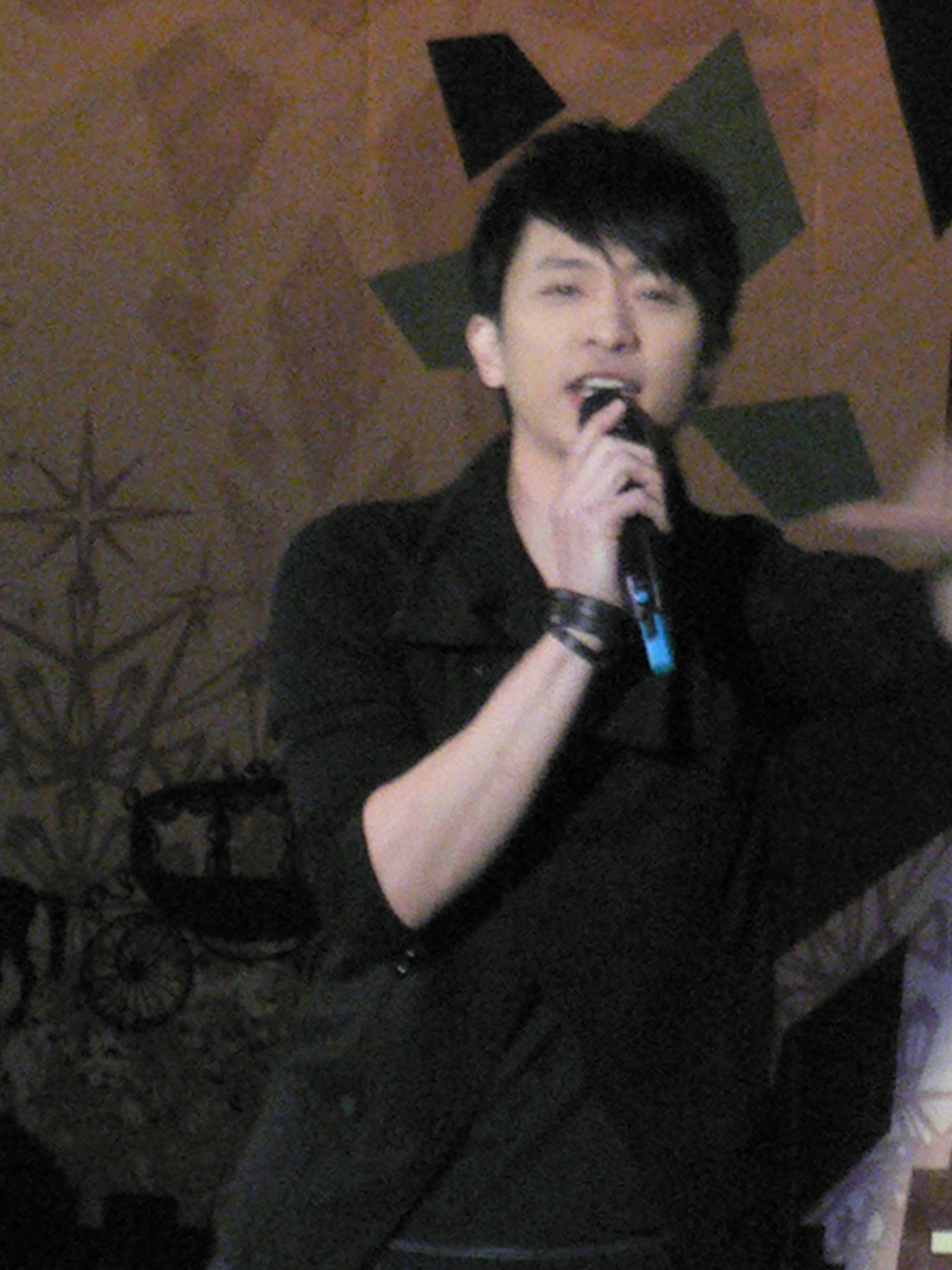 石康鈞在南台科技大學的《Nice Team Night》校園演唱會